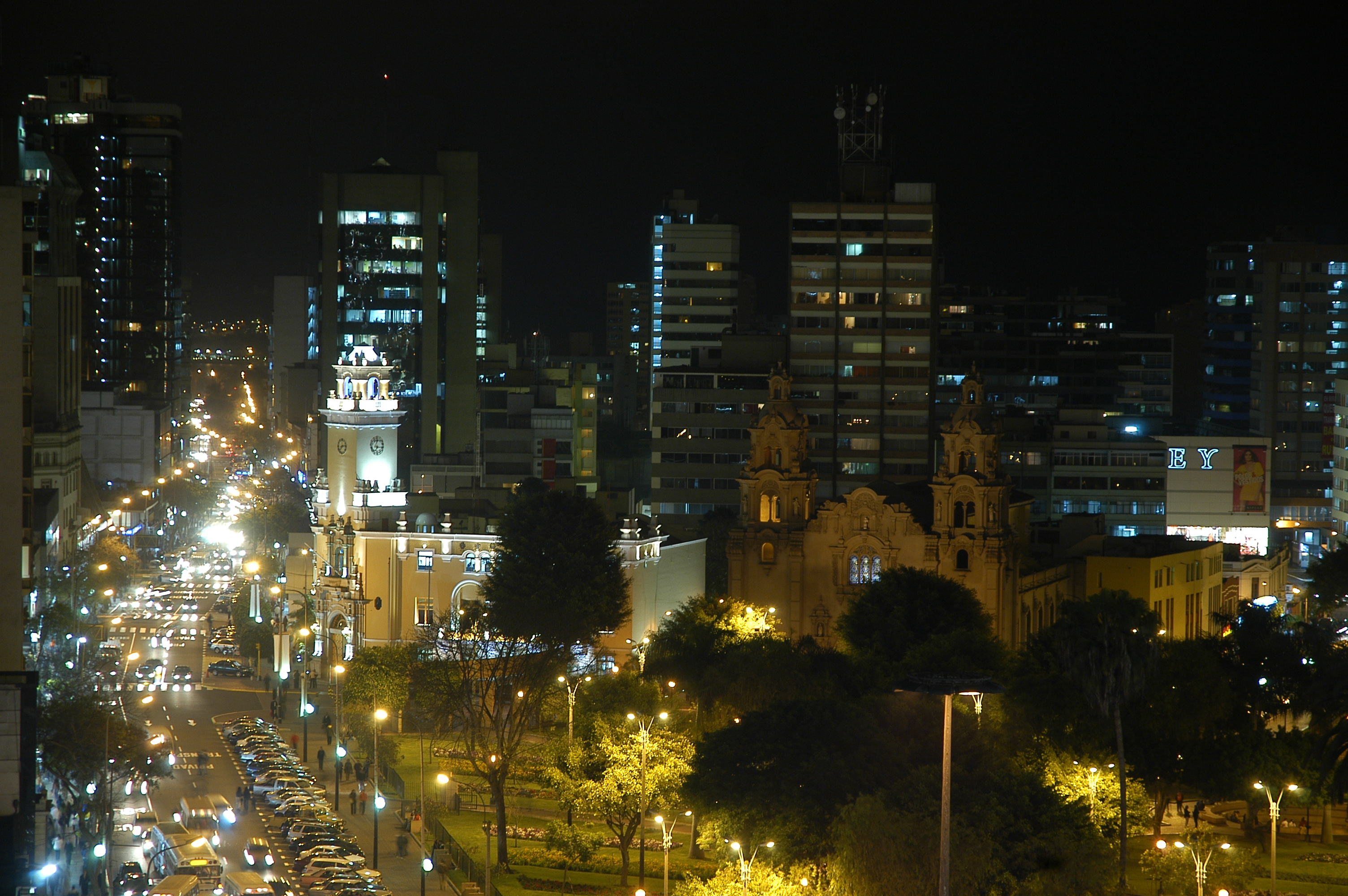 Vista nocturna del distrito de Miraflores, Lima, Perú.